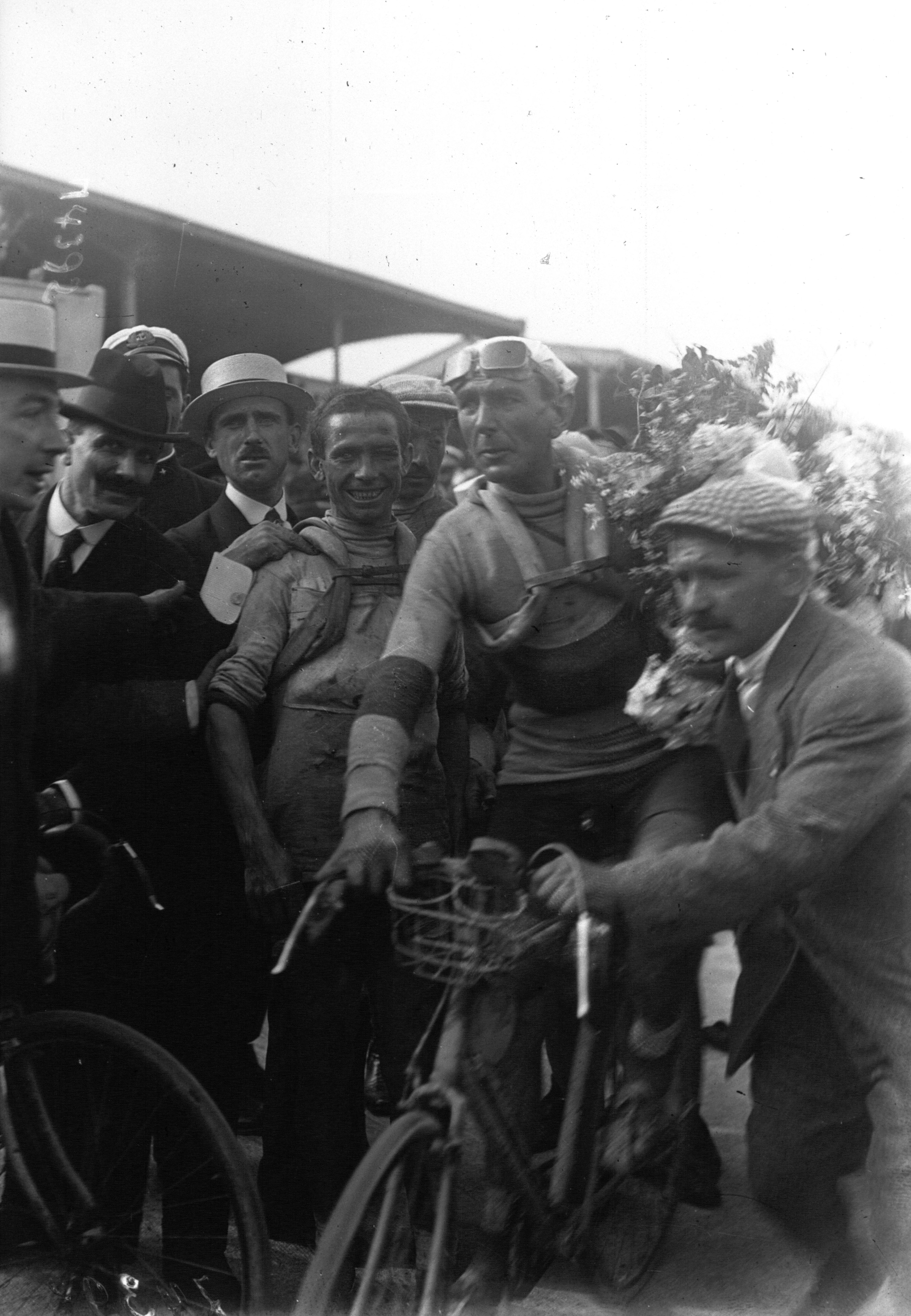 Arrivée du Tour de France au Parc des Princes : arrivée au sprint : le premier Alavoine.